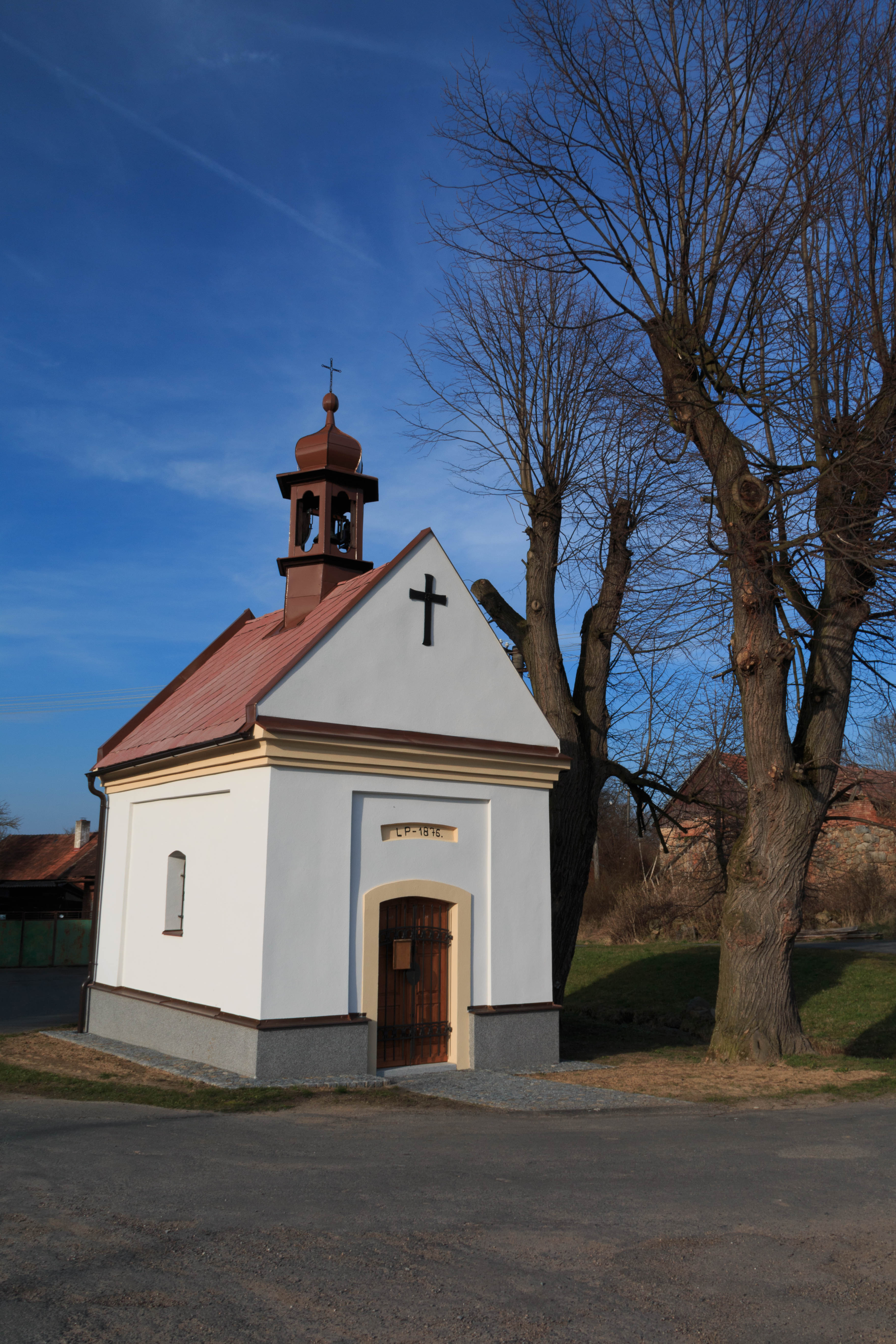 Habroveč kaple